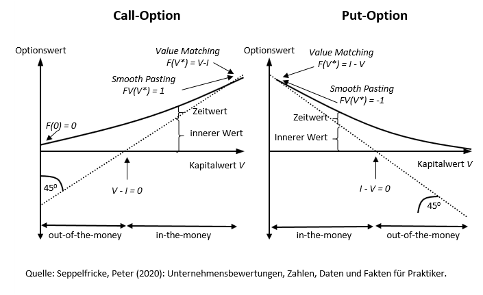 Randbedingungen von Optionen